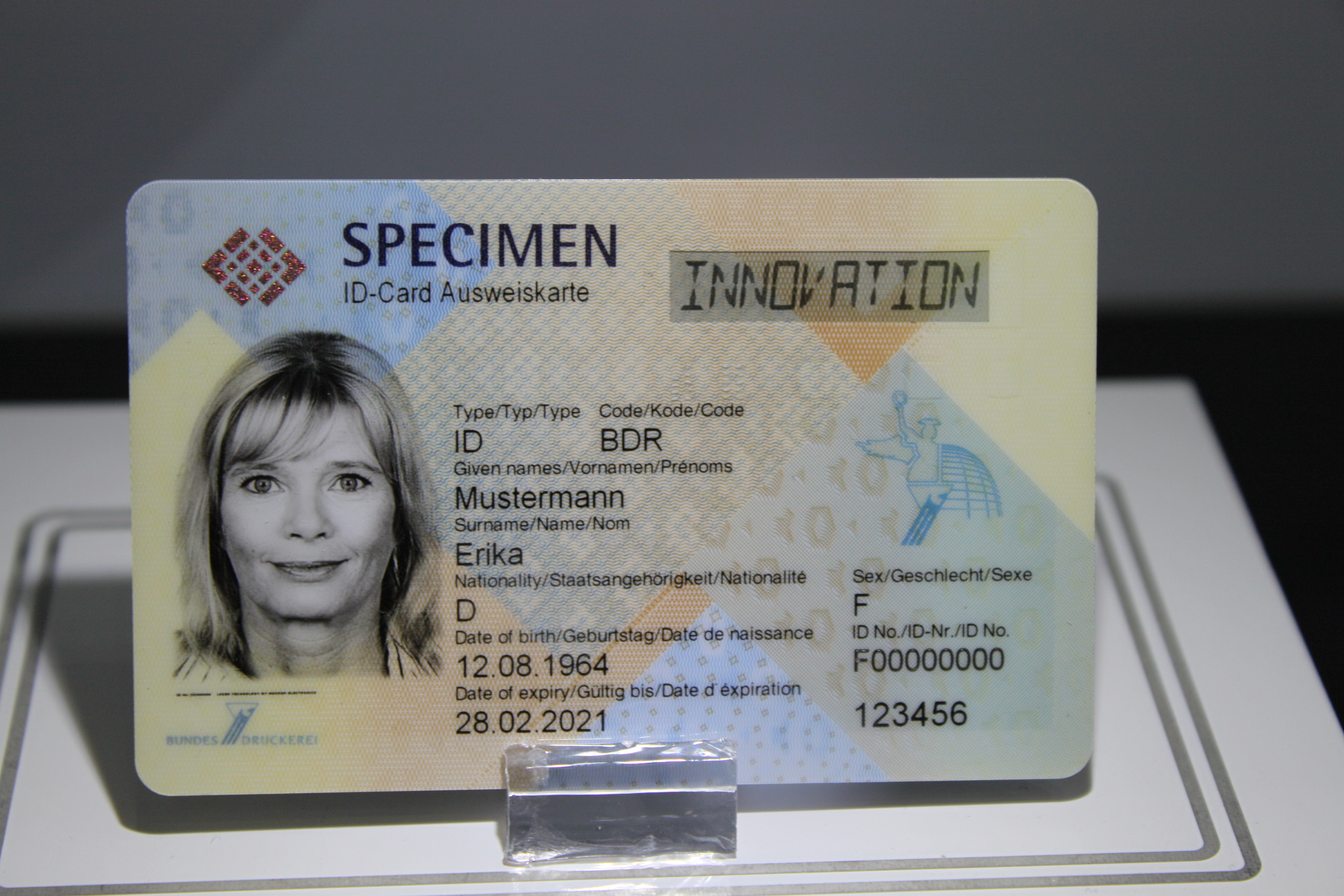 CeBIT 2011; Passport Entwurf der Bundesdruckerei auf der CeBIT; mit OLED-Display